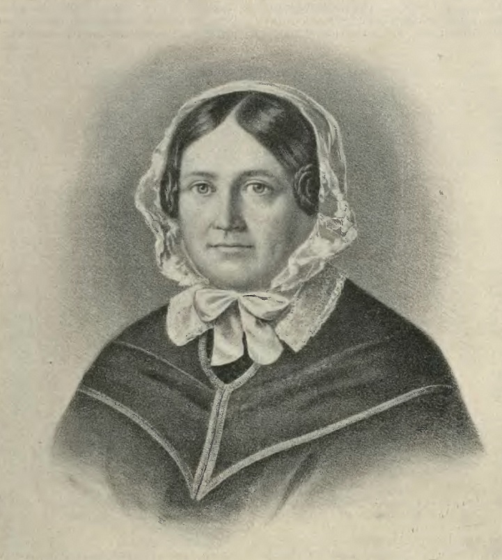 Ewa Felińska z Wendorffów (1793-1859)